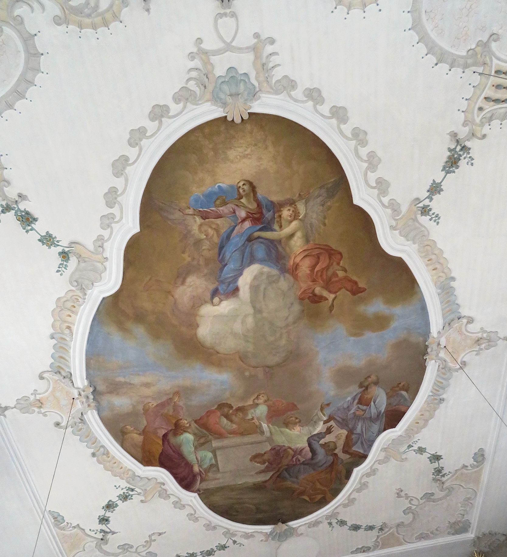 St. Peter und Paul in Hopfen am See ist eine barockisierte Kirche, deren Ursprünge wohl auf das 11. Jh. zurückgehen. Sie enthält gotische Fresken und Malereien von Claudius Schraudolph dem Älteren und Alois Keller sowie Stuck von Joseph Fischer aus Faulenbach.